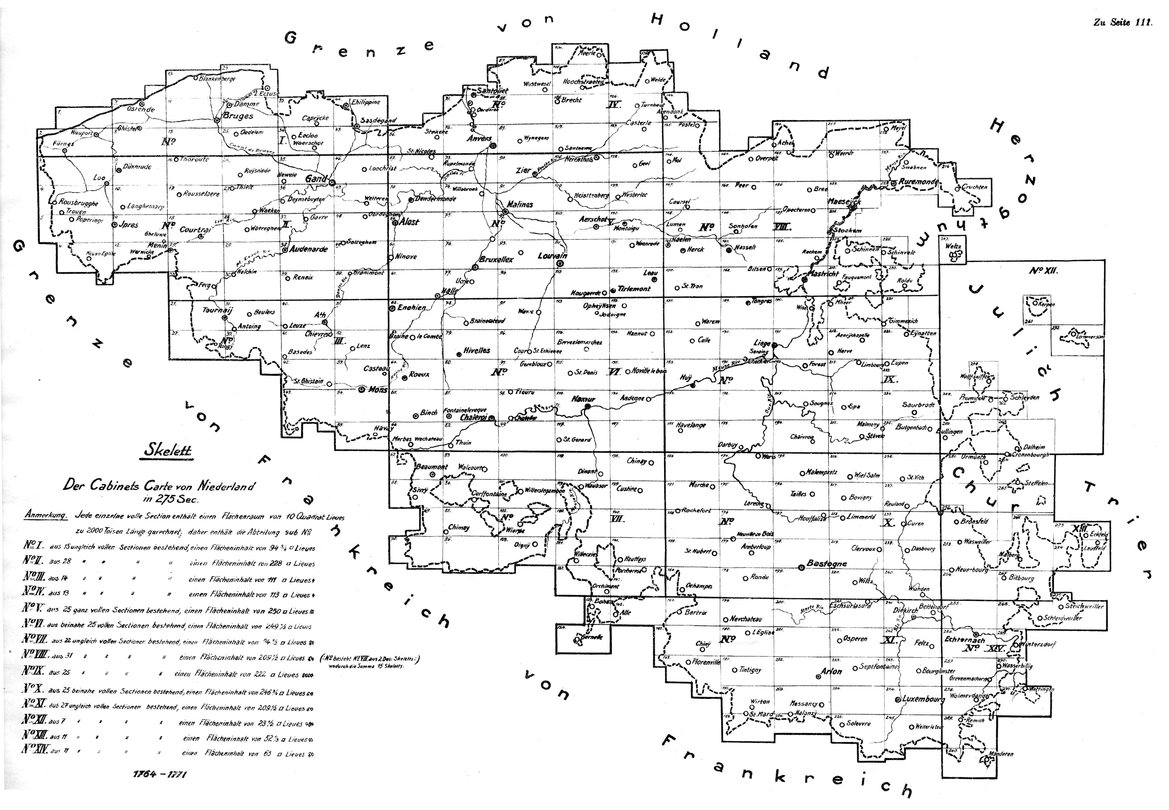 Harta generală a Olandei în hărţile iosefine, executată între anii 1764-71.